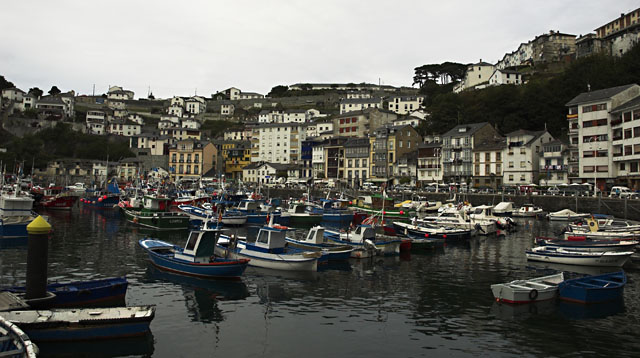 Puerto de Luarca en Asturias